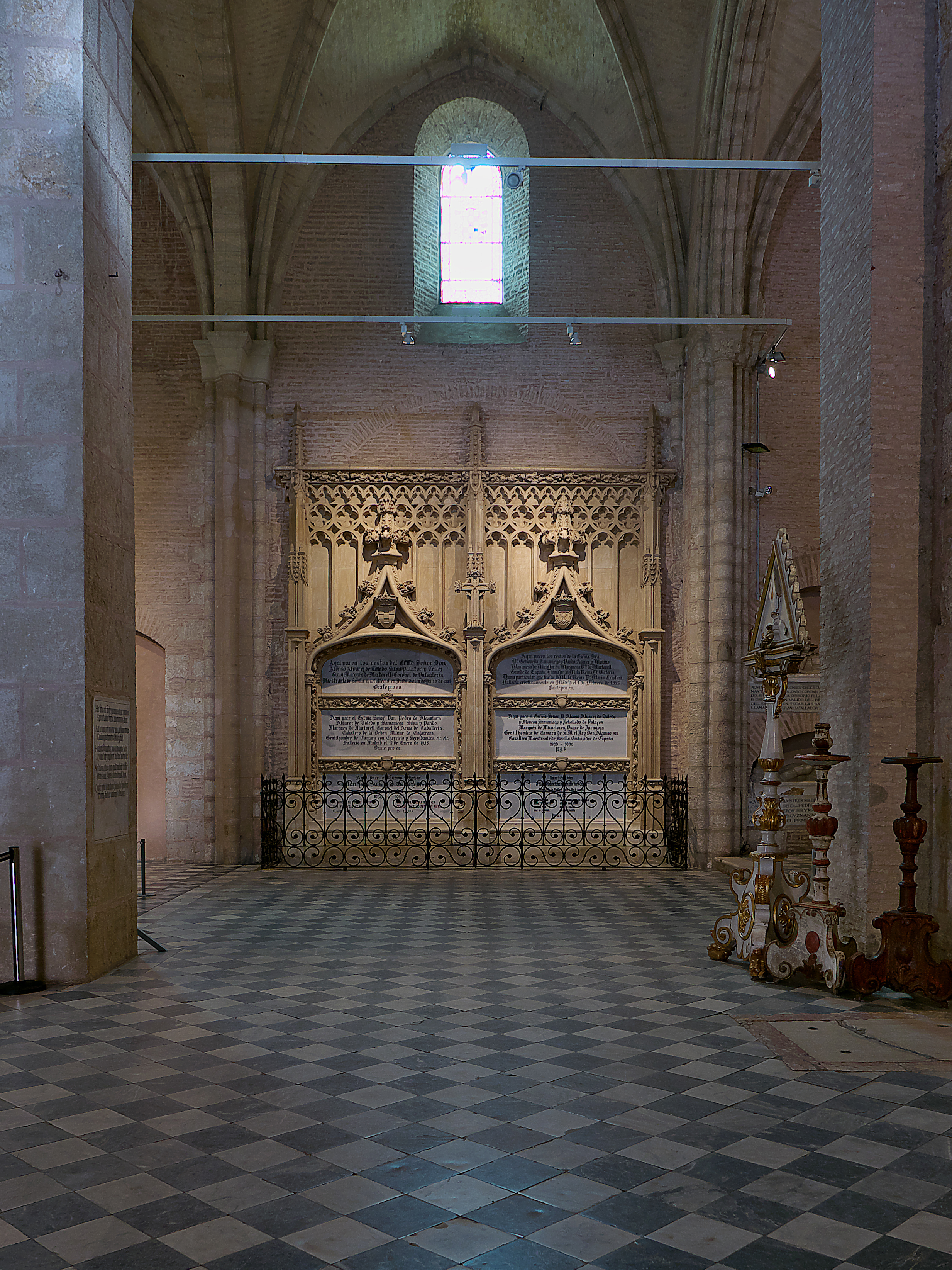 Monasterio de San Isidoro del Campo. Muro norte de la iglesia de Juan Alonso Pérez de Guzmán. Sepulcros de los marqueses de Miraflores y de los marqueses de Martorell.